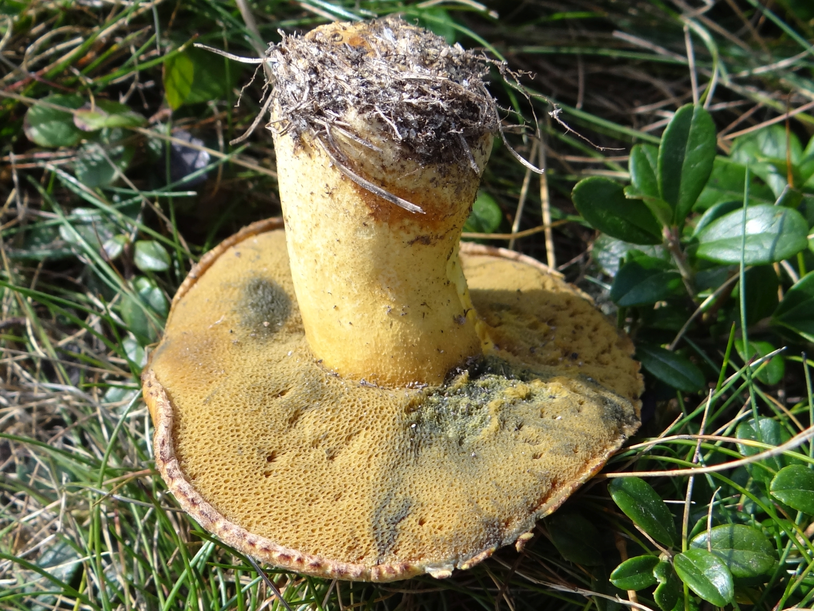 Suillus variegatus. Location: Poland, Trzciana, województwo małopolskie